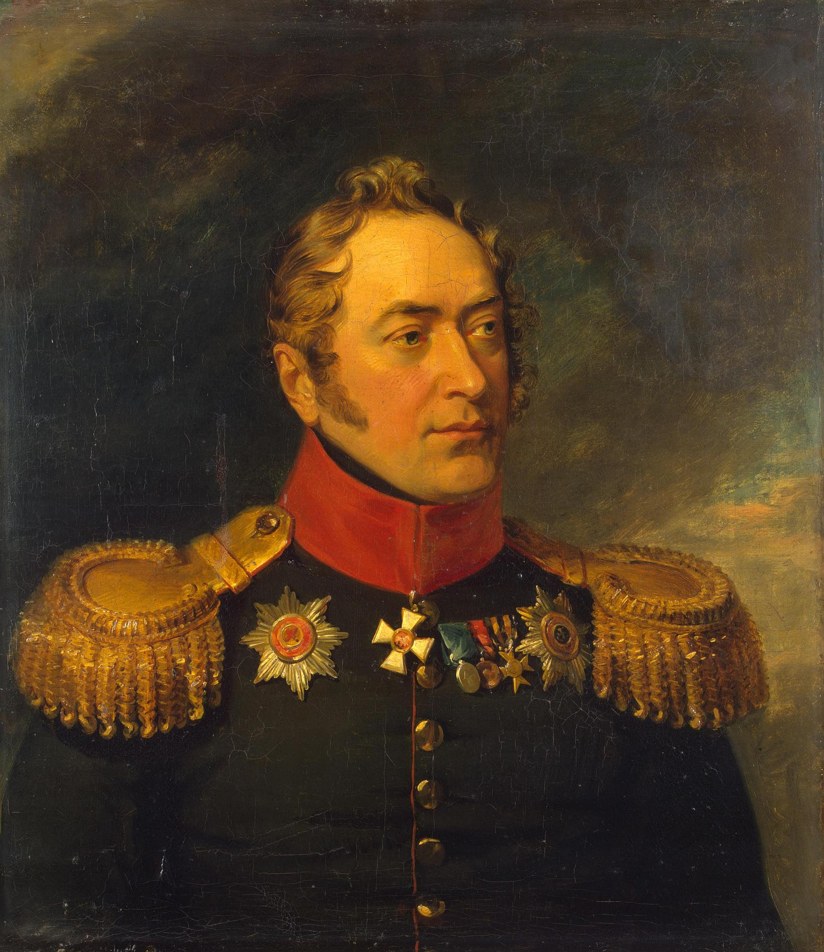 Nikolay Nikolaevich Hovansky (01.12.1777 – 20.11.1837) russian general